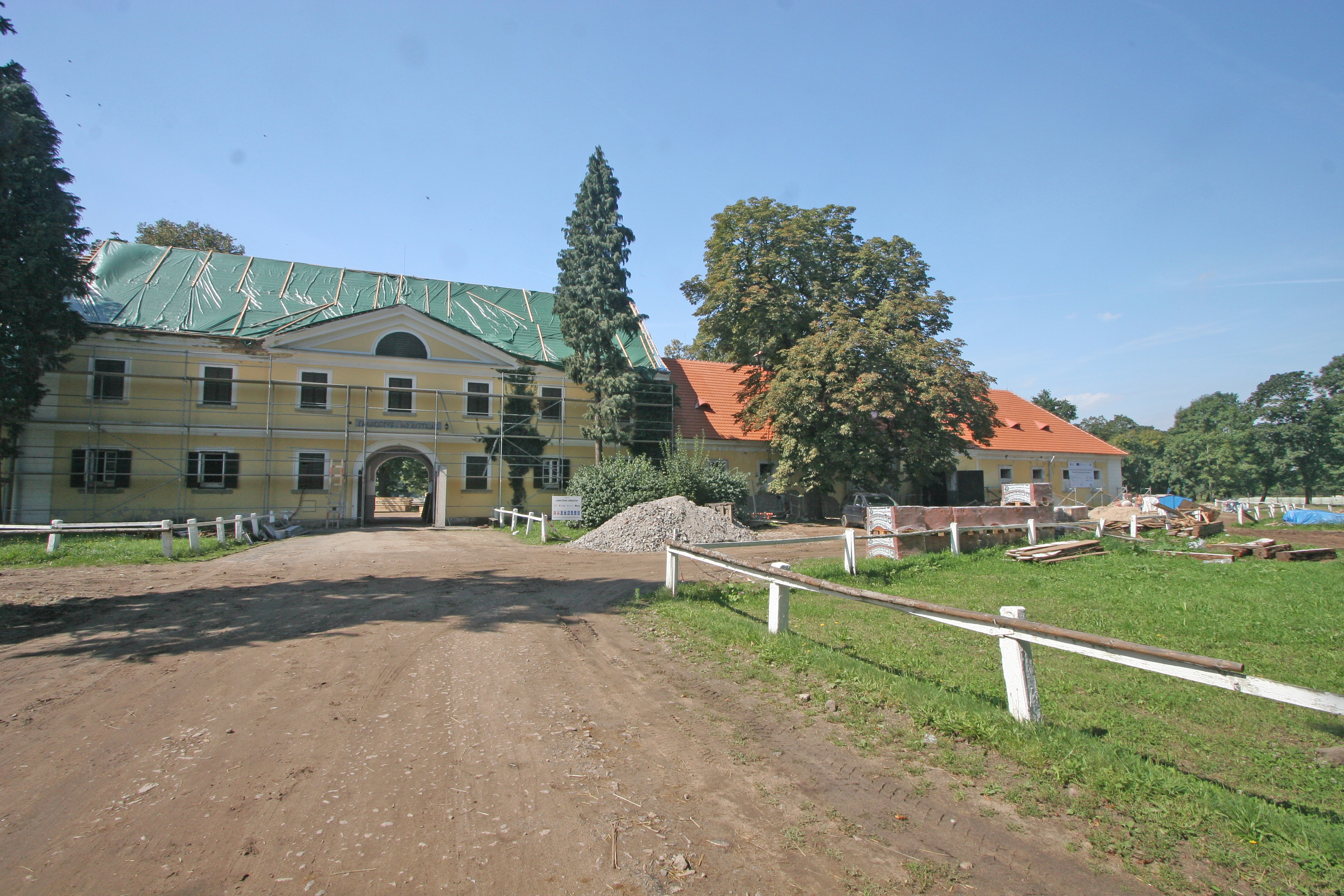 Selmice dvůr Františkov Kladrubský hřebčín, Kladruby nad Labem 1, 2, 3, 13, 23, E34, 42, 44, 46, 47, 48, 55, 58, 70, 92, Selmice 1, 3, 4, 5, 6, 40, 55, 99, Hlavečník, Semín, Kladruby nad Labem.